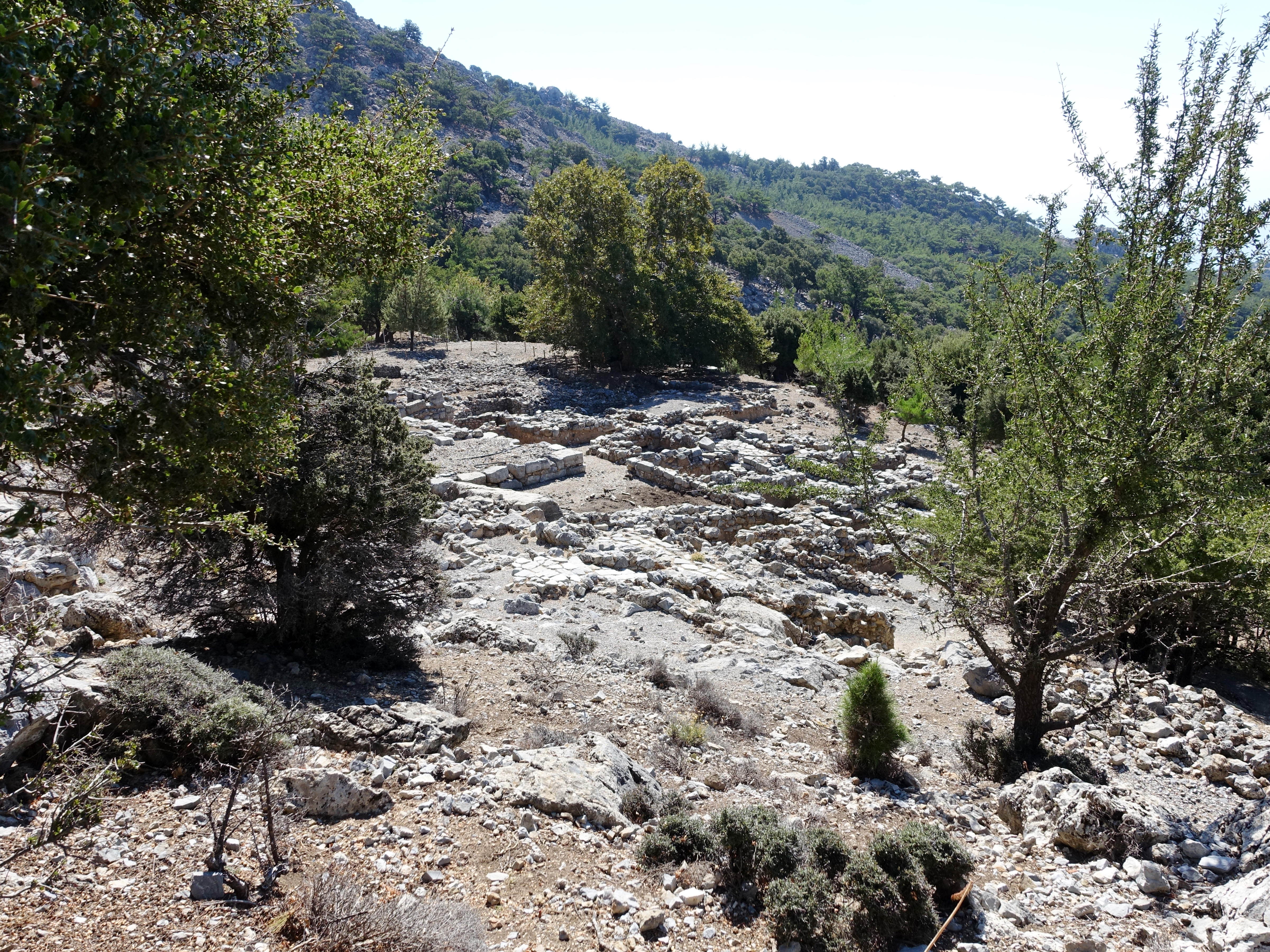 Heiligtum des Hermes und der Aphrodite oberhalb des Ortes Kato Symi (Κάτω Σύμη), Kreta, Griechenland